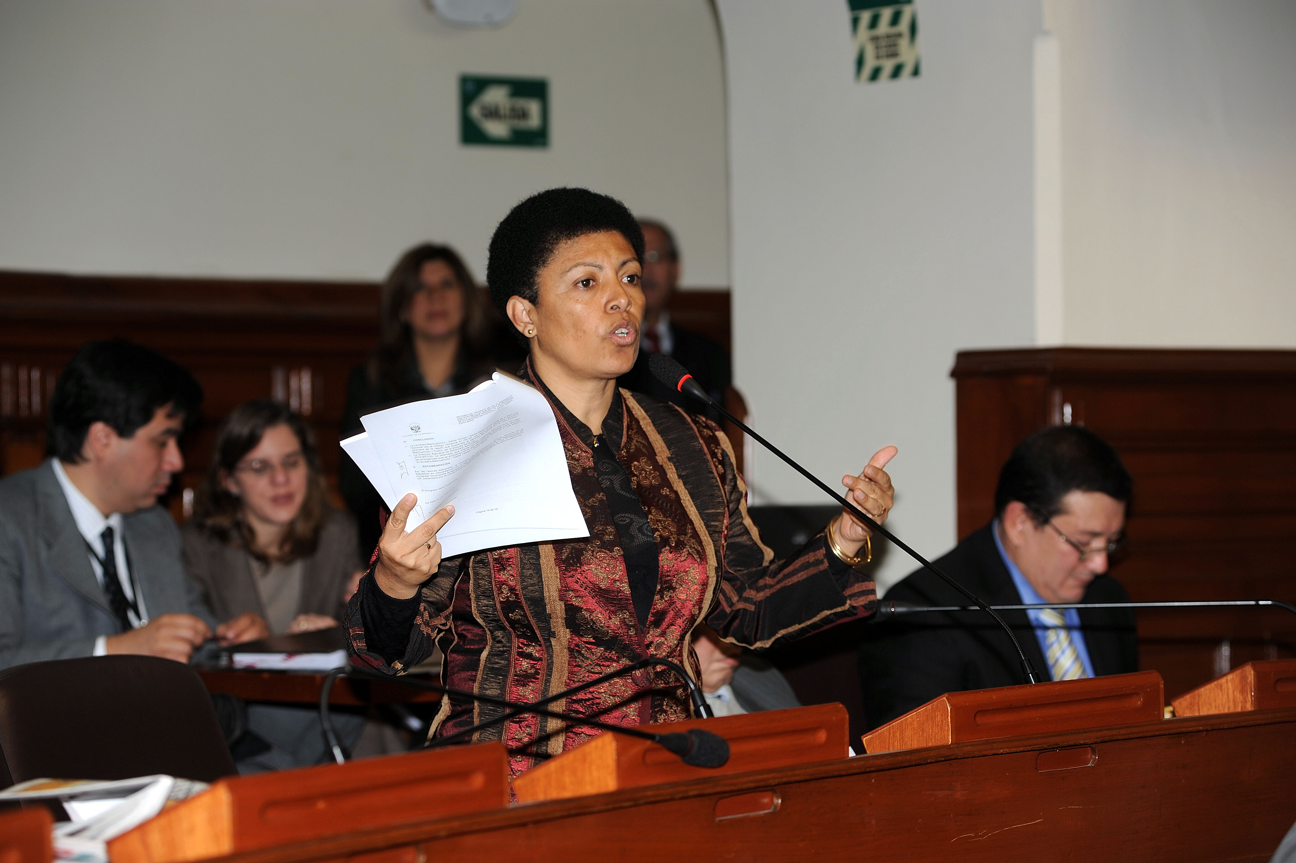 El legislador Martha Moyano expresa su posición en el debate parlamentario realizado esta mañana por el Pleno congresal.